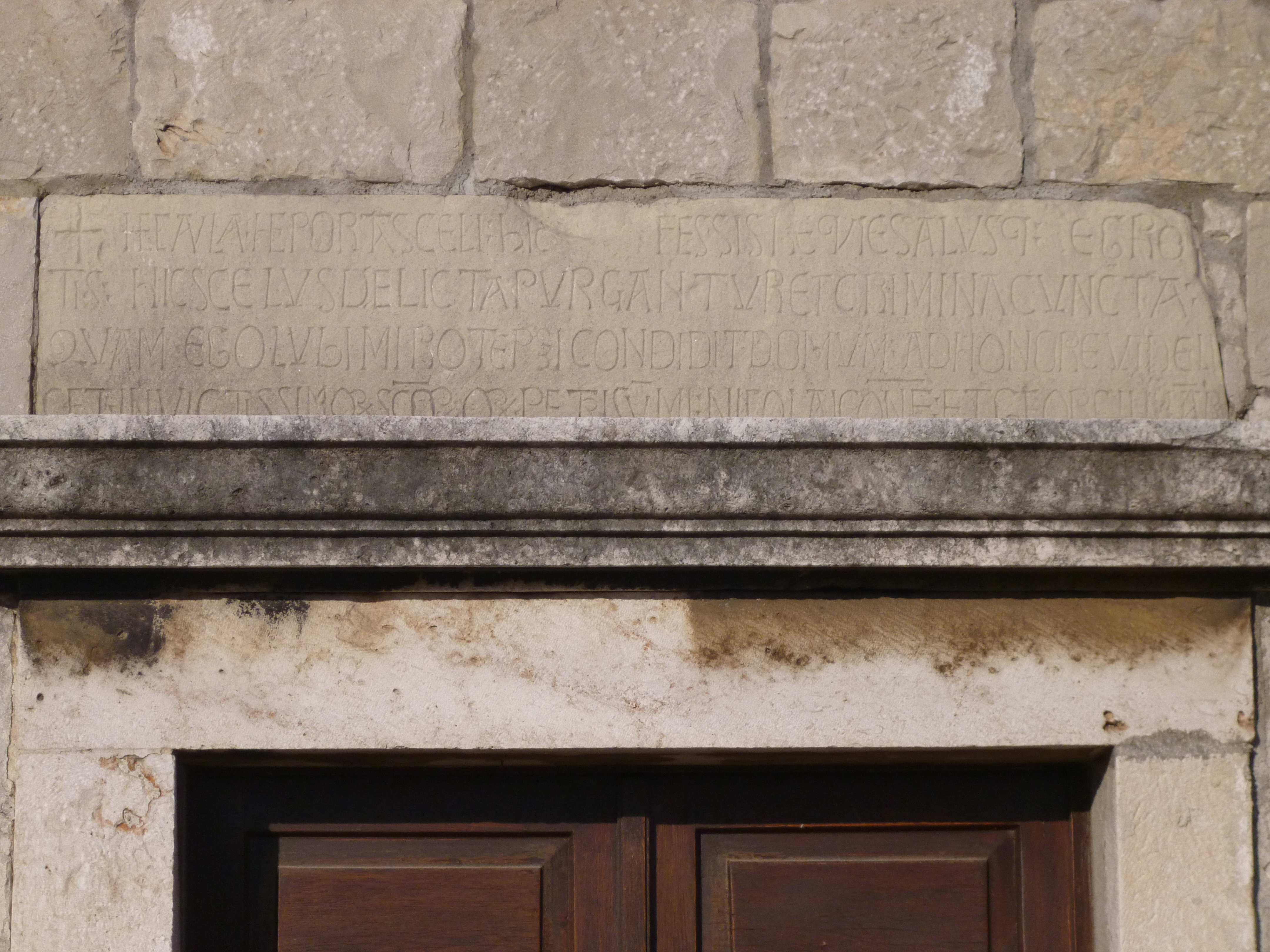 natpis s crkve Sv.Nikola od Podmorja iz 10.stoljeća,danas se nalazi uzidan u novoj crkvi Sv.Nikola -Kaštel Stari